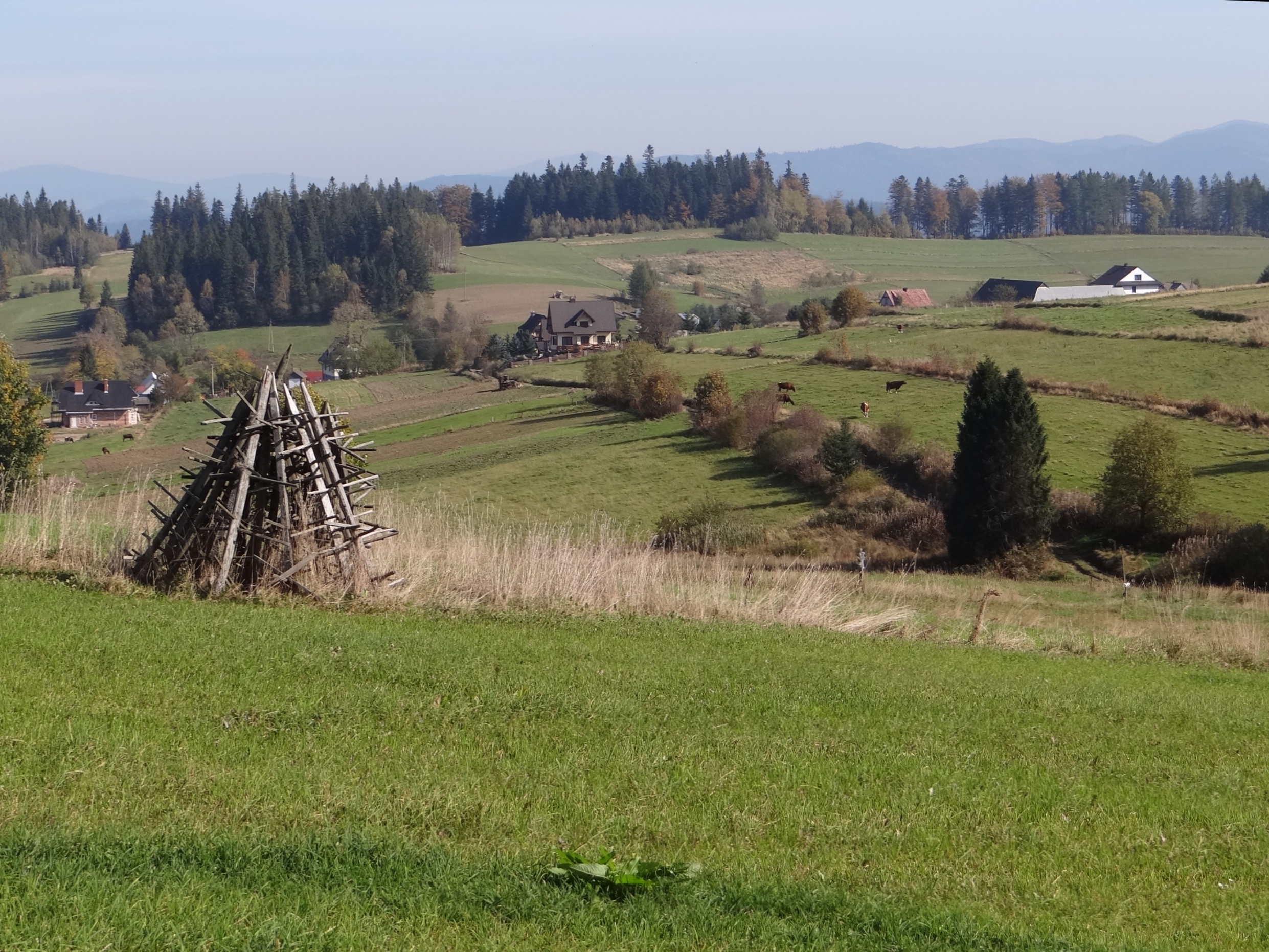 Krajobraz w miejscowości Harkabuz